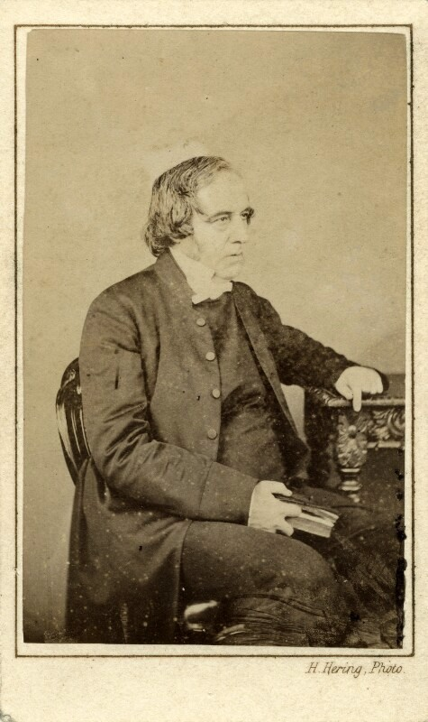 Photograph by Henry Hering